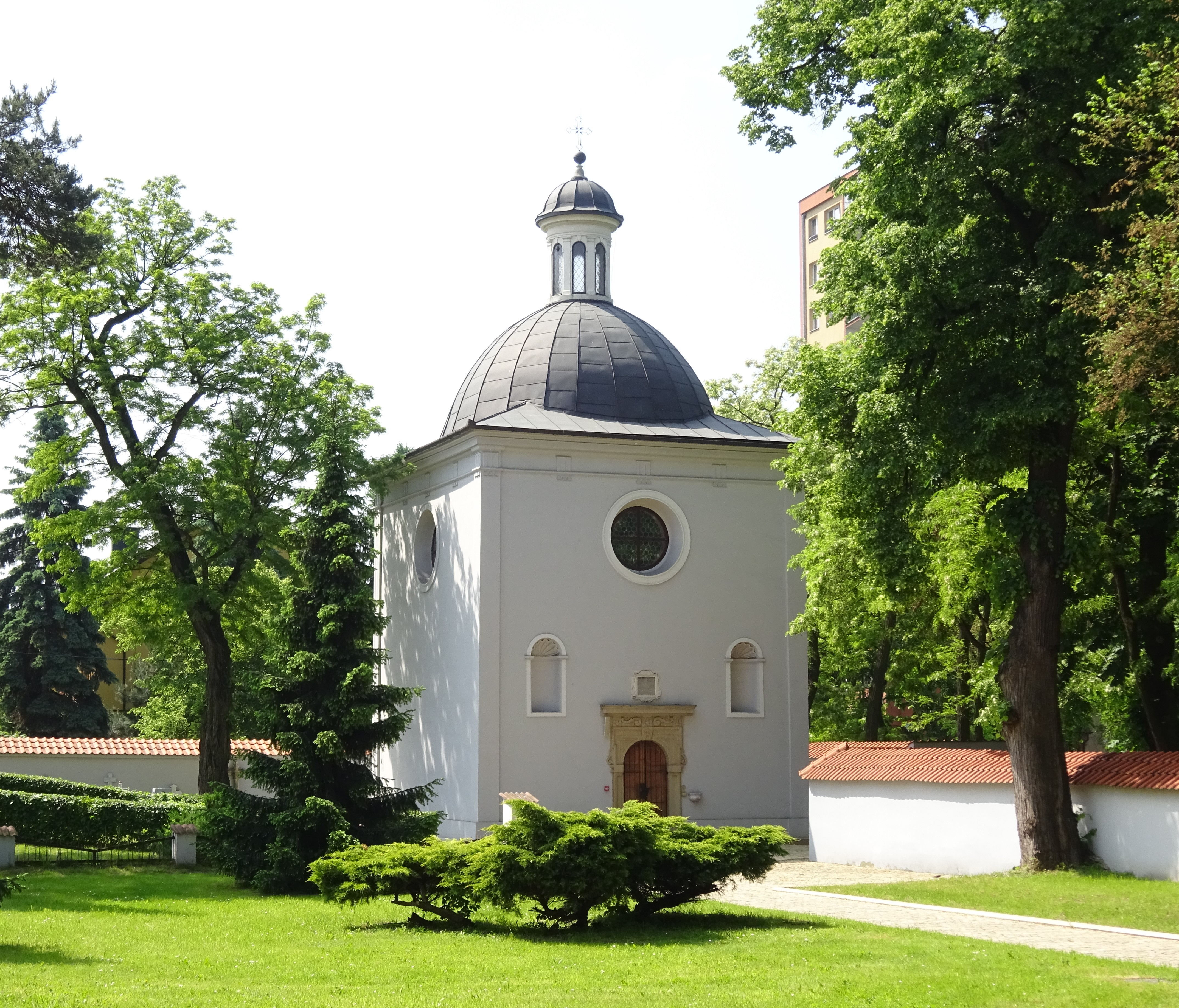 Kaplica św. Jana Chrziciela na Prądniku Czerwonym przy ul. Dobrego Pasterza w Krakowie. Stan po remoncie.